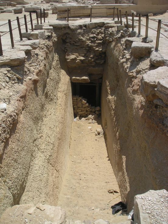 Vue de l'entrée du complexe souterrain de la tombe d'Hotepsekhemoui à Saqqarah - IIe dynastie égyptienne